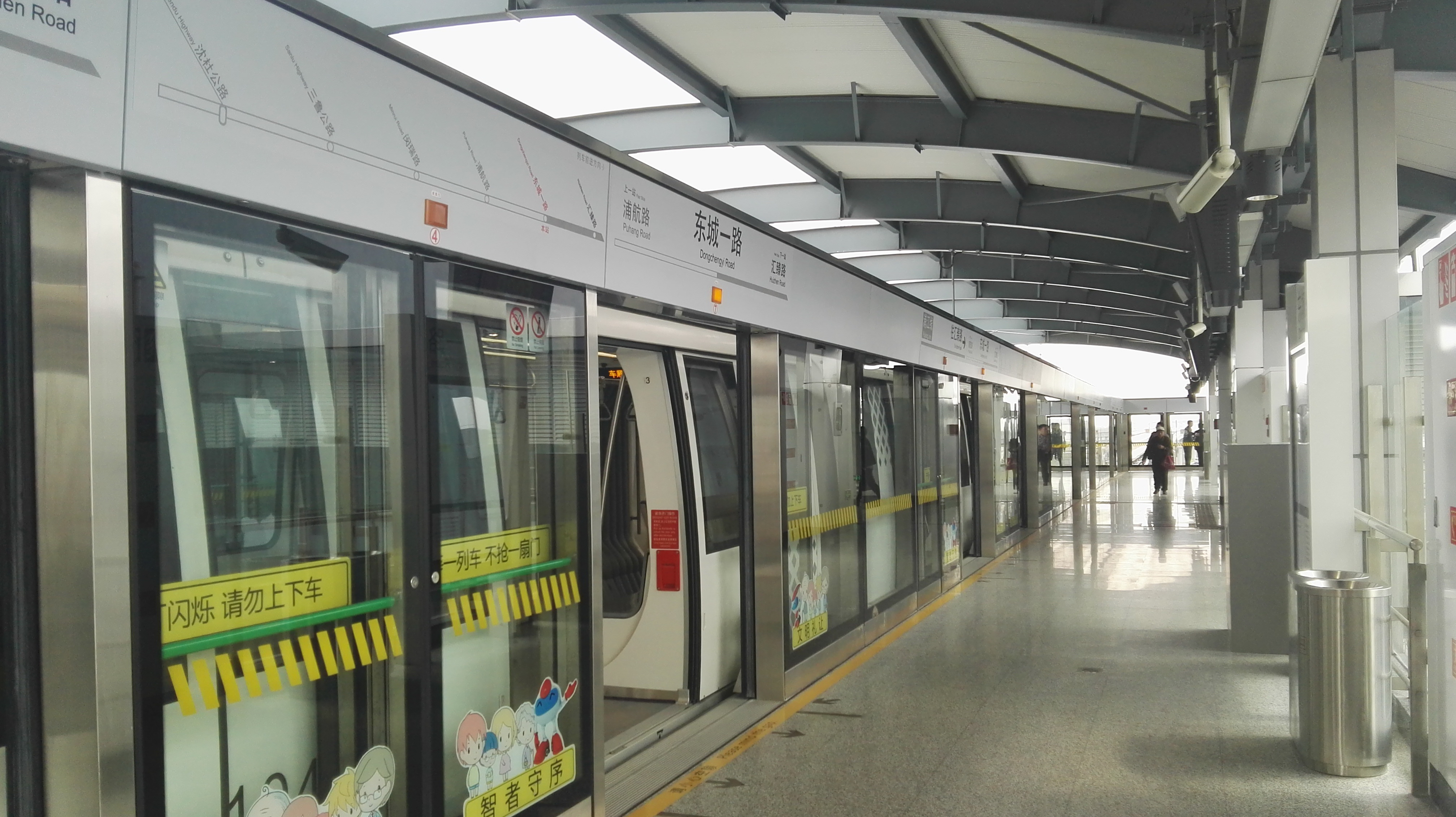 东城一路站汇臻路方向站台。